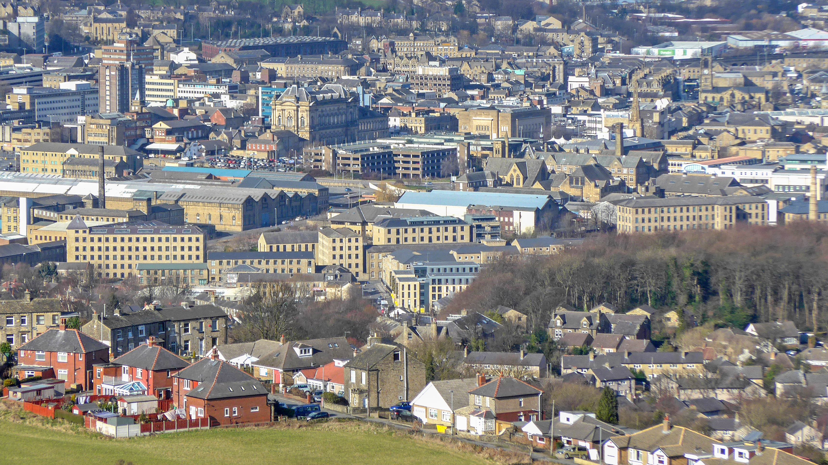 Huddersfield